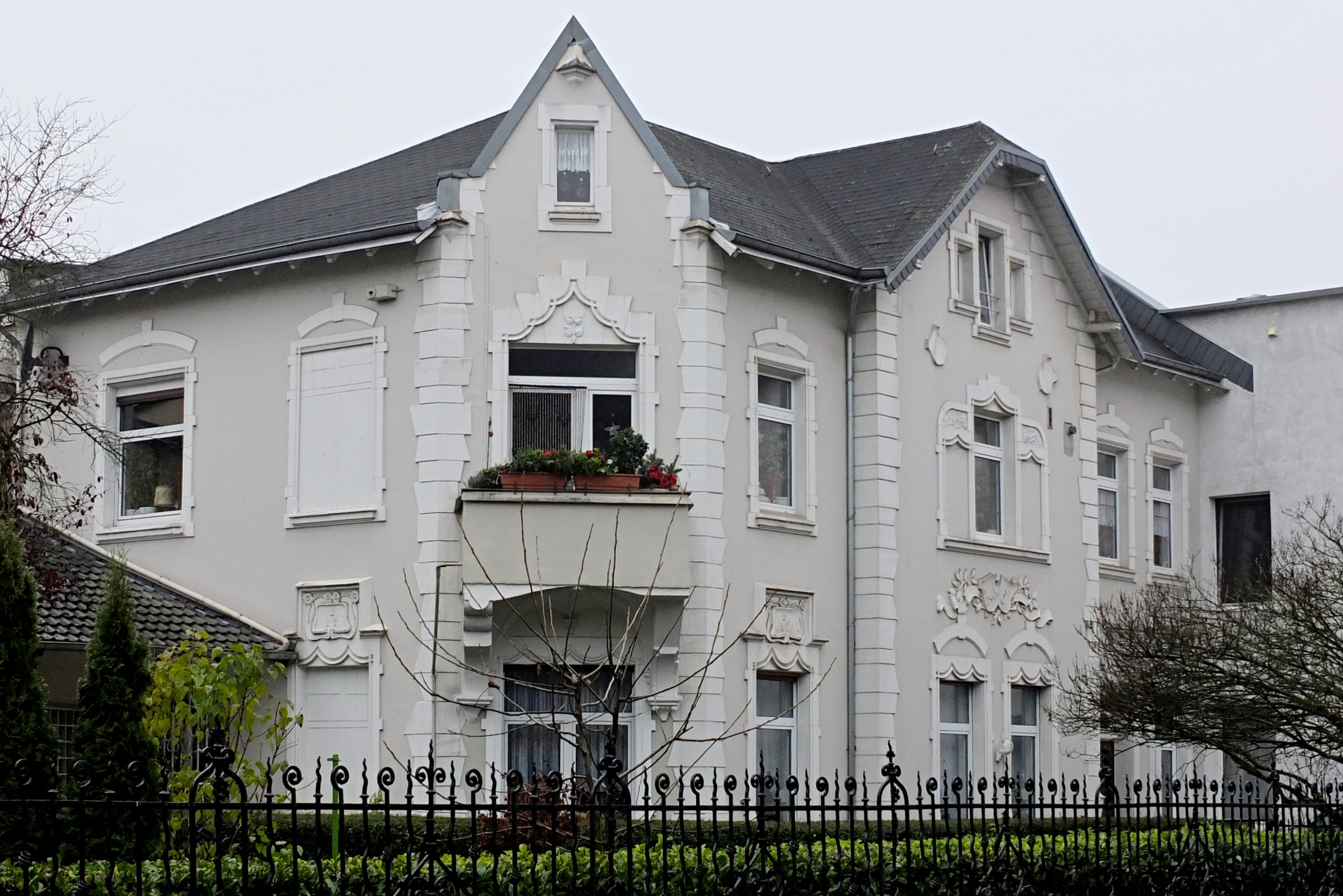 Wohnhaus, Hilden, Hagelkreuzstraße 3